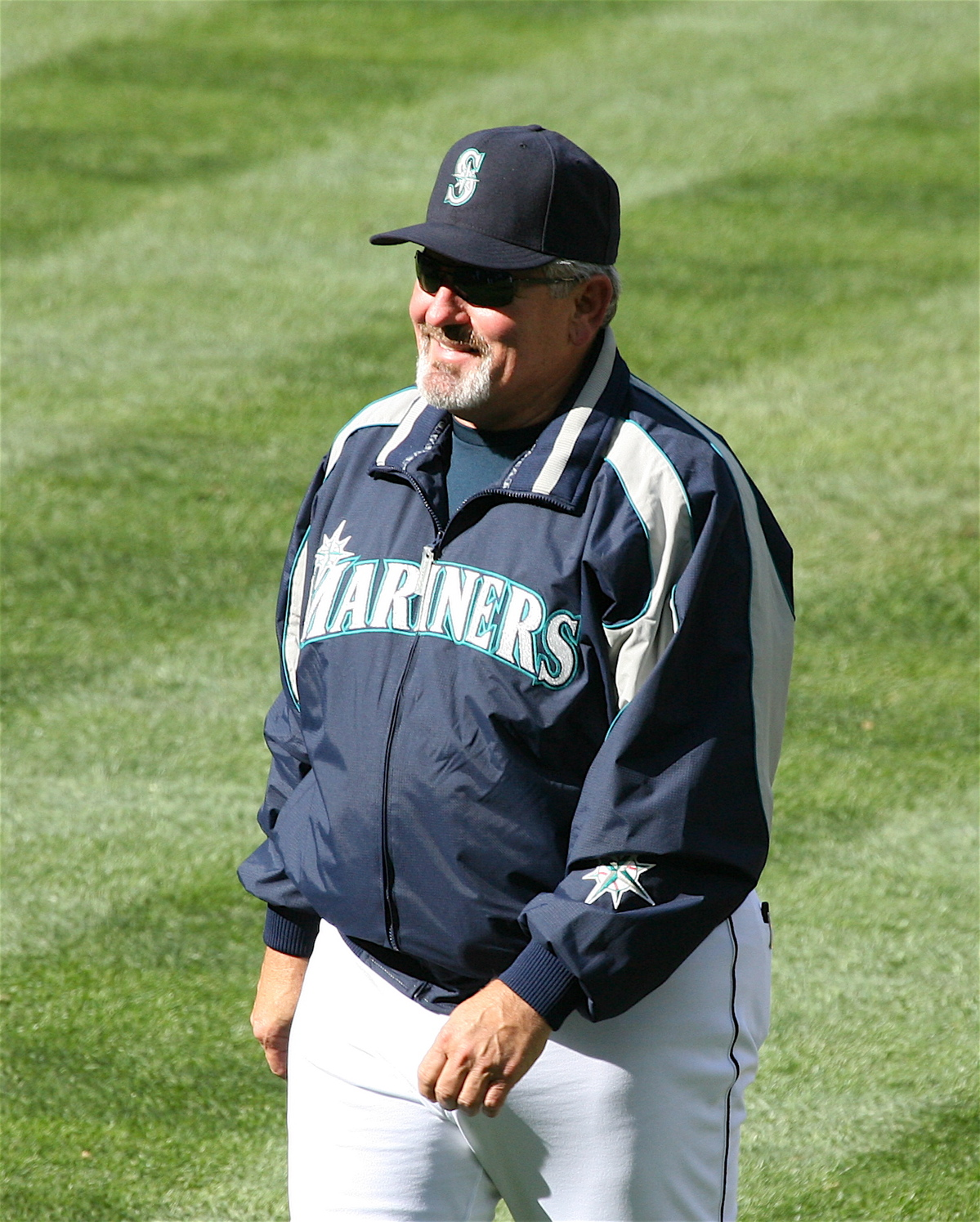 Mike Hargrove